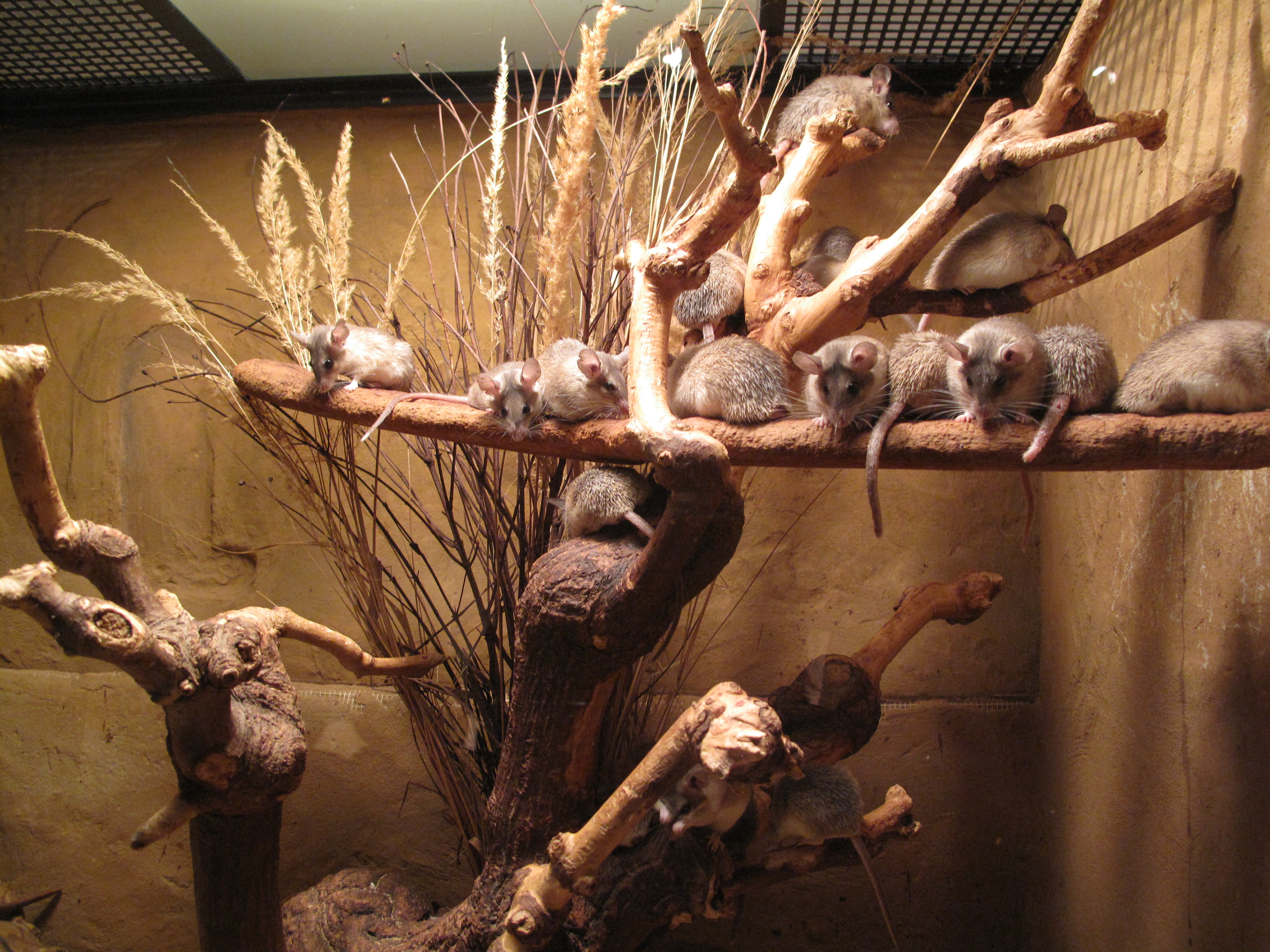 Zoo Praha